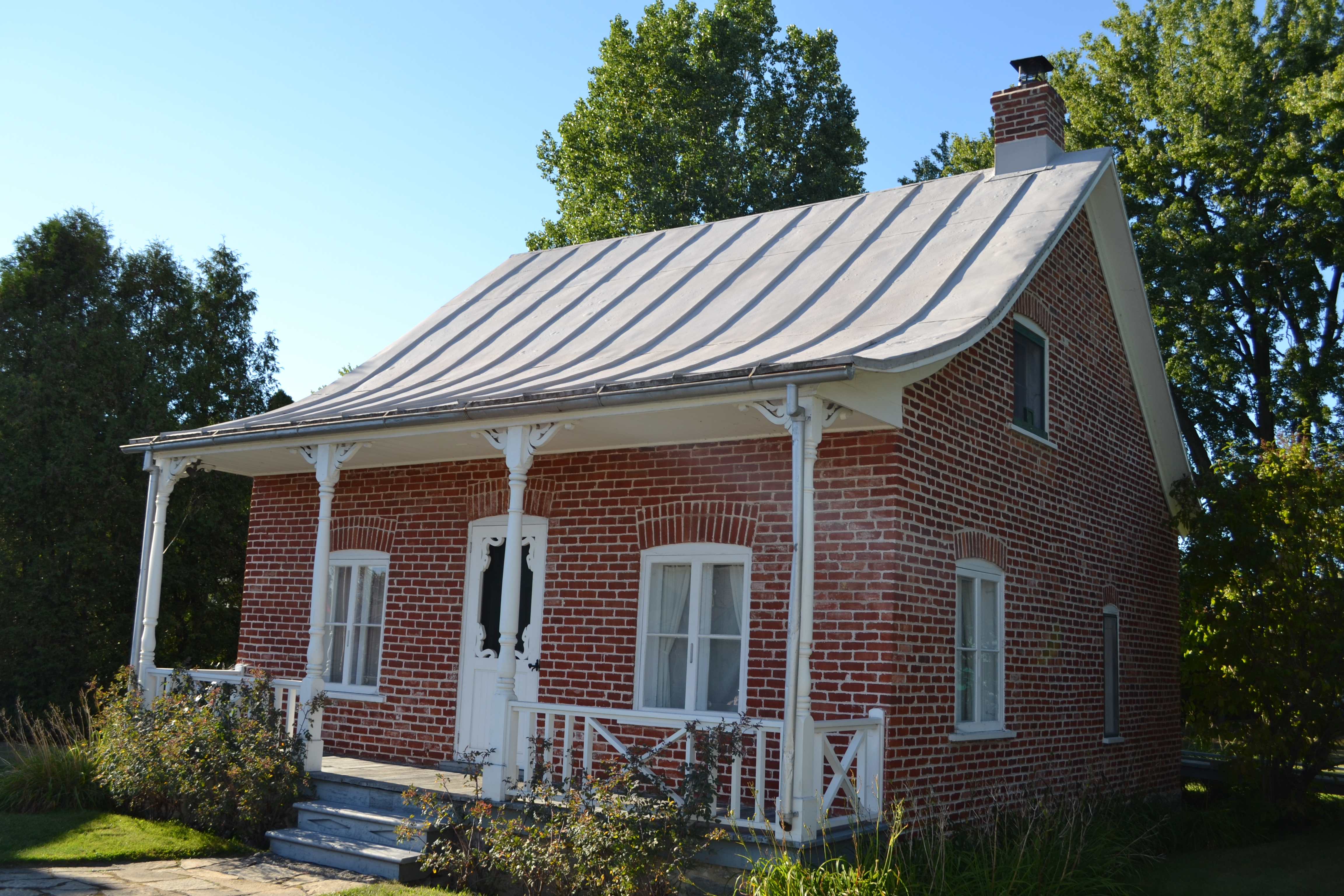 Le lieu historique national du Canada de Sir-Wilfrid-Laurier commémore le lieu de naissance de sir Wilfrid Laurier.